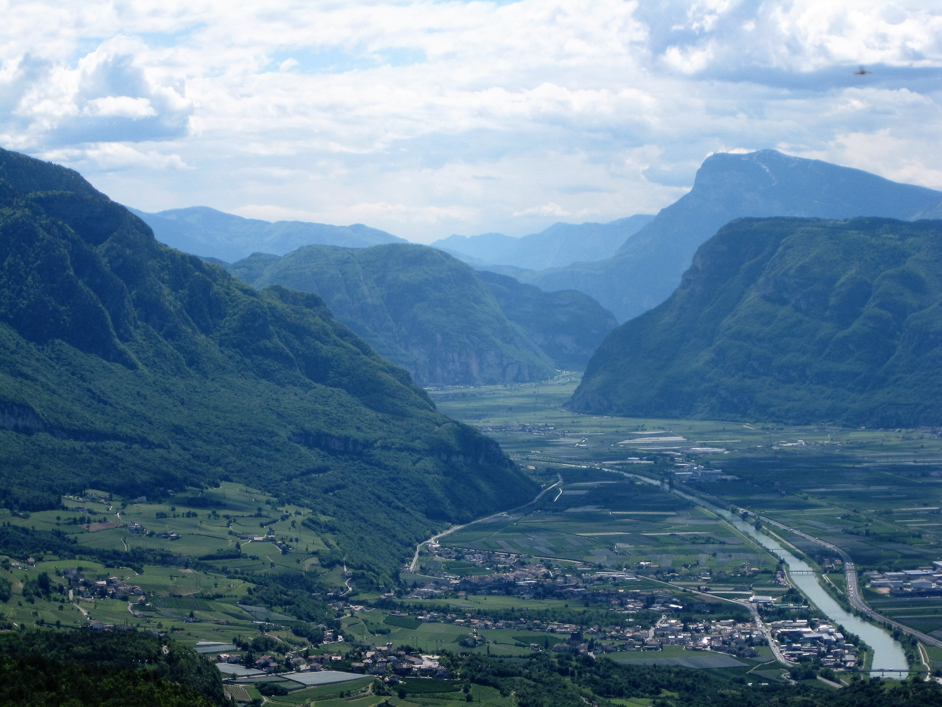 Blick auf das Unterland von der Rotwand in südliche Richtung, die Salurner Klause in der Bildmitte, im Vordergrund Neumarkt, im Hintergrund die Paganella